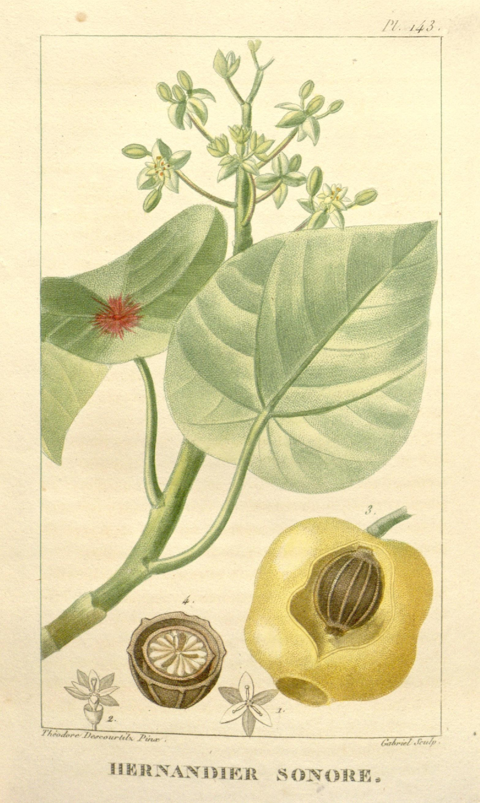 Hernandia sonora - botanical illustration